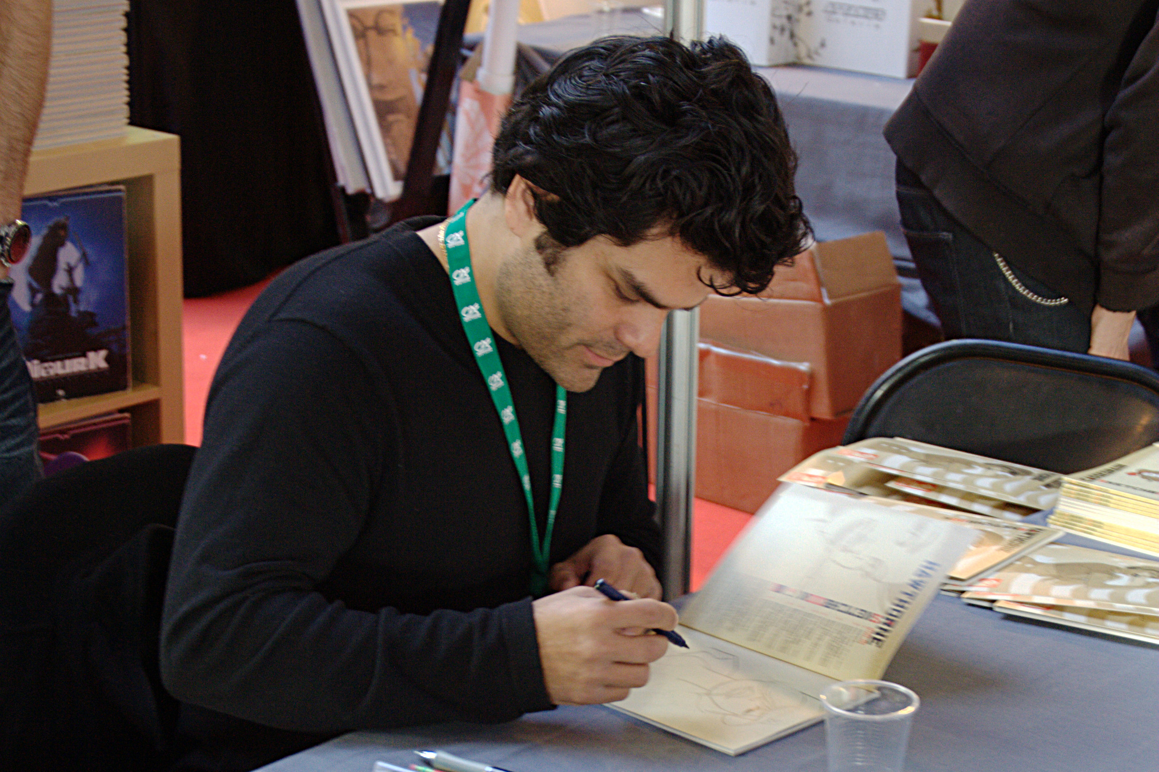 Mike Hawthorne lors de Quai des Bulles à Saint-Malo le 27 octobre 2012.